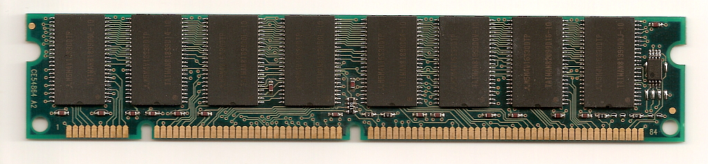 PAMIĘĆ SDR SDRAM 16MB